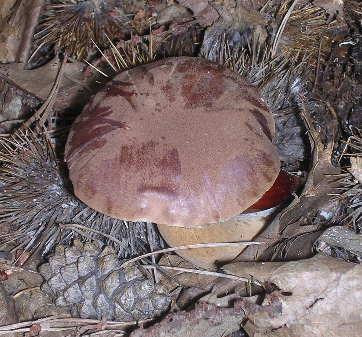 Boletus badius